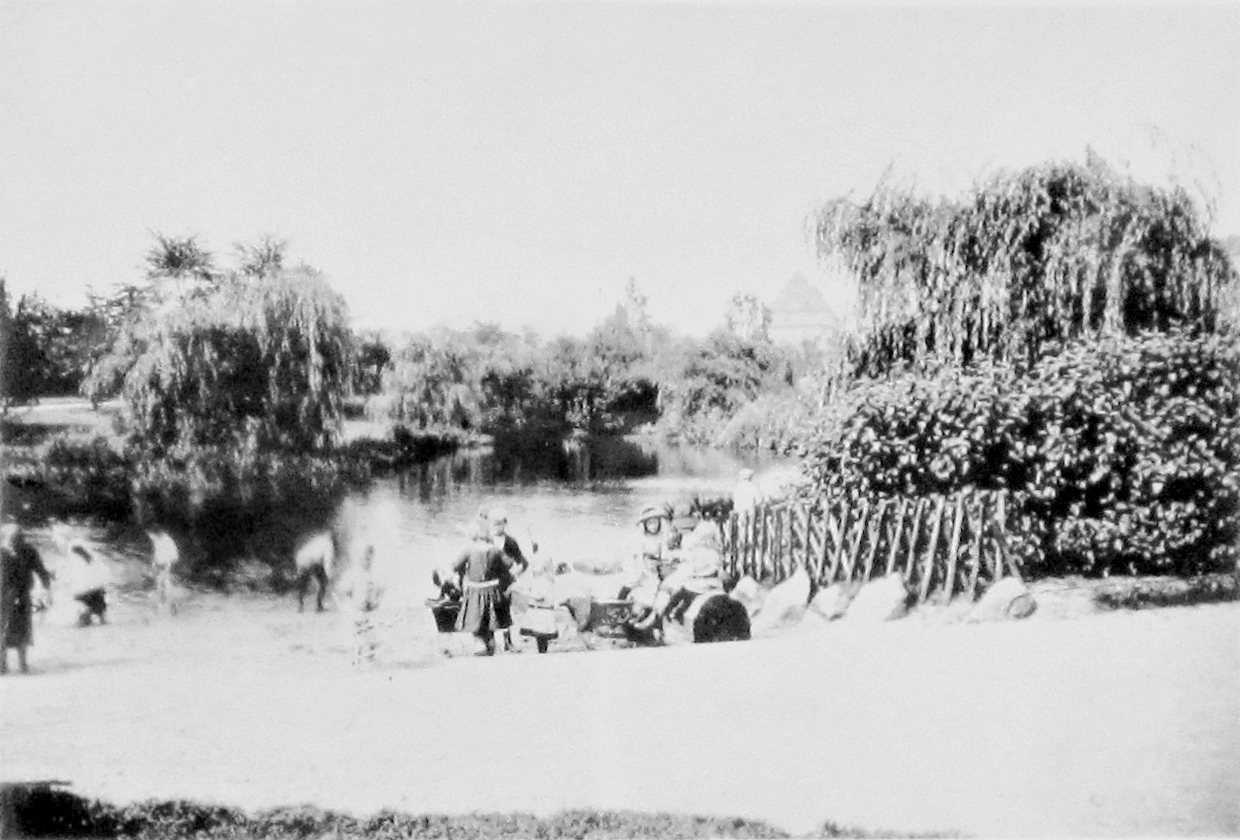 Die Geschichtstafel am Schleidenpark in Barmbek-Süd beschäftigt sich mit dem Park, der für das neu gebaute Arbeiterwohnquartier in den 1900er Jahren angelegt worden ist.